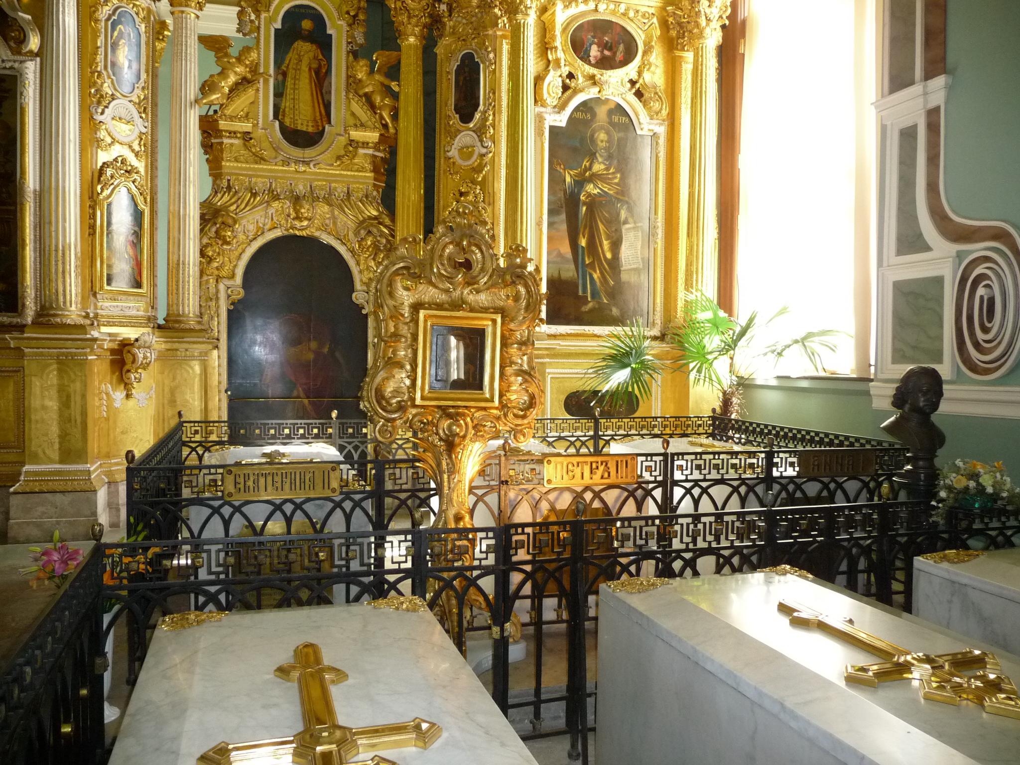 RussianTzarsTumbs-p1030589.jpg